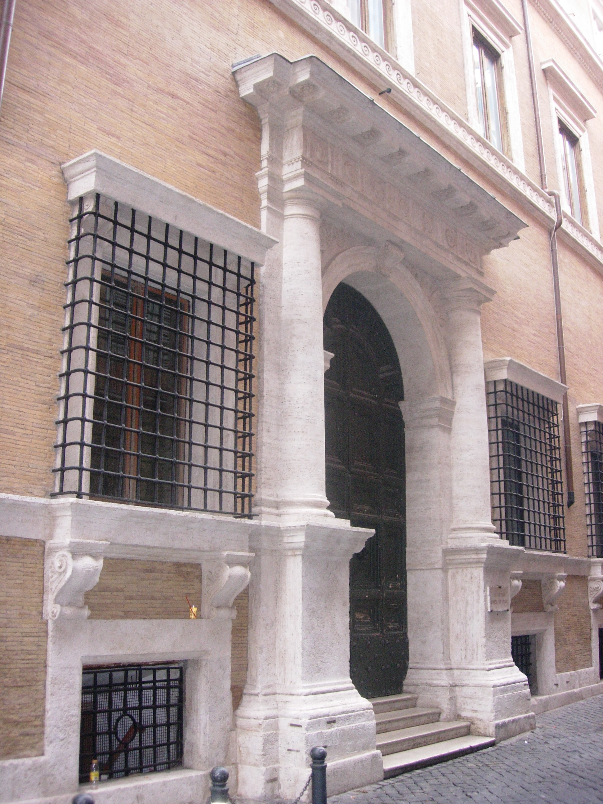 Foto del portale di ingresso di palazzo baldassini a roma